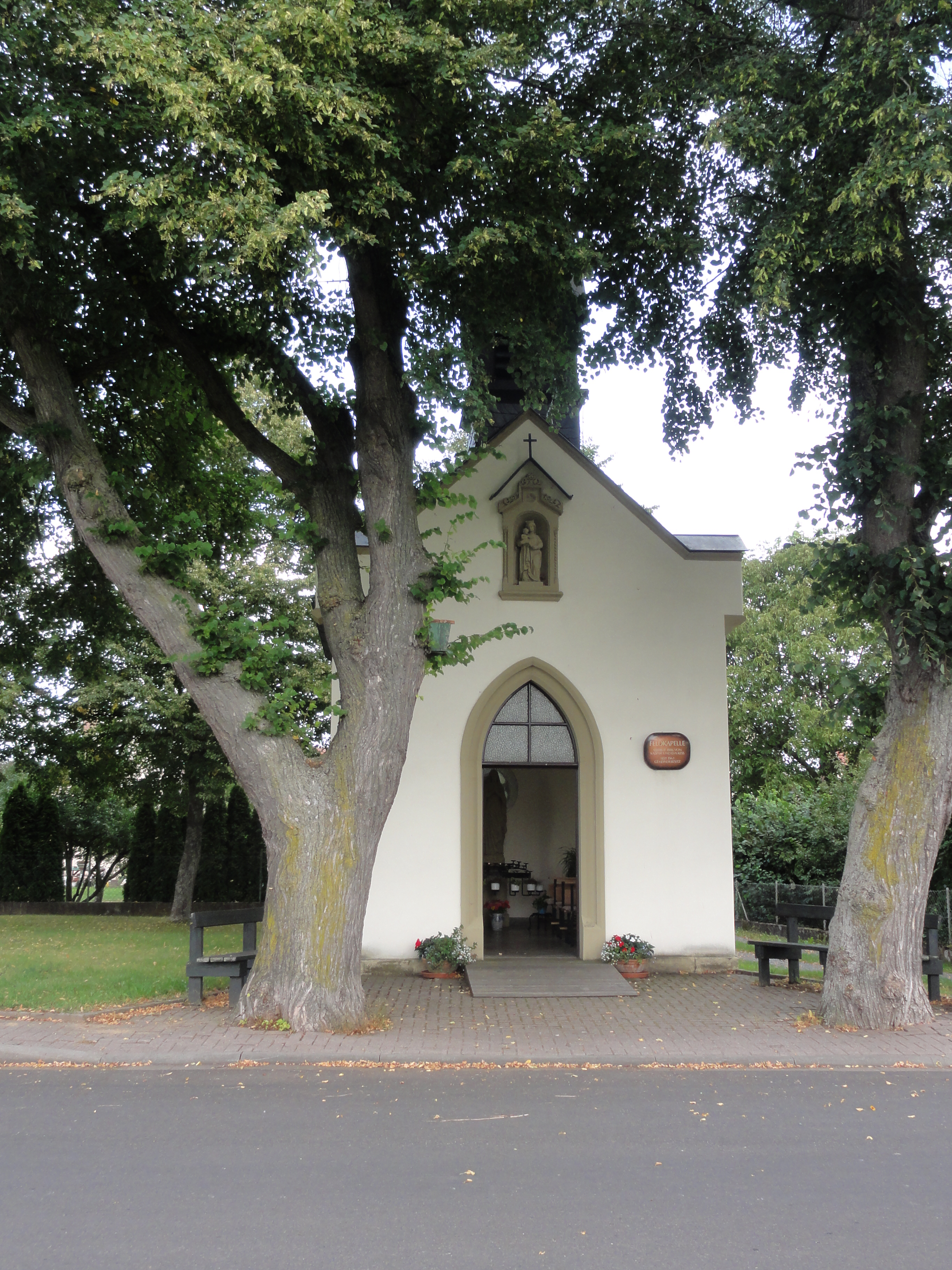 "Käppele", Kapellenweg, Grafenrheinfeld, Deutschland Denkmal Akten-Nr: D-6-78-136-15